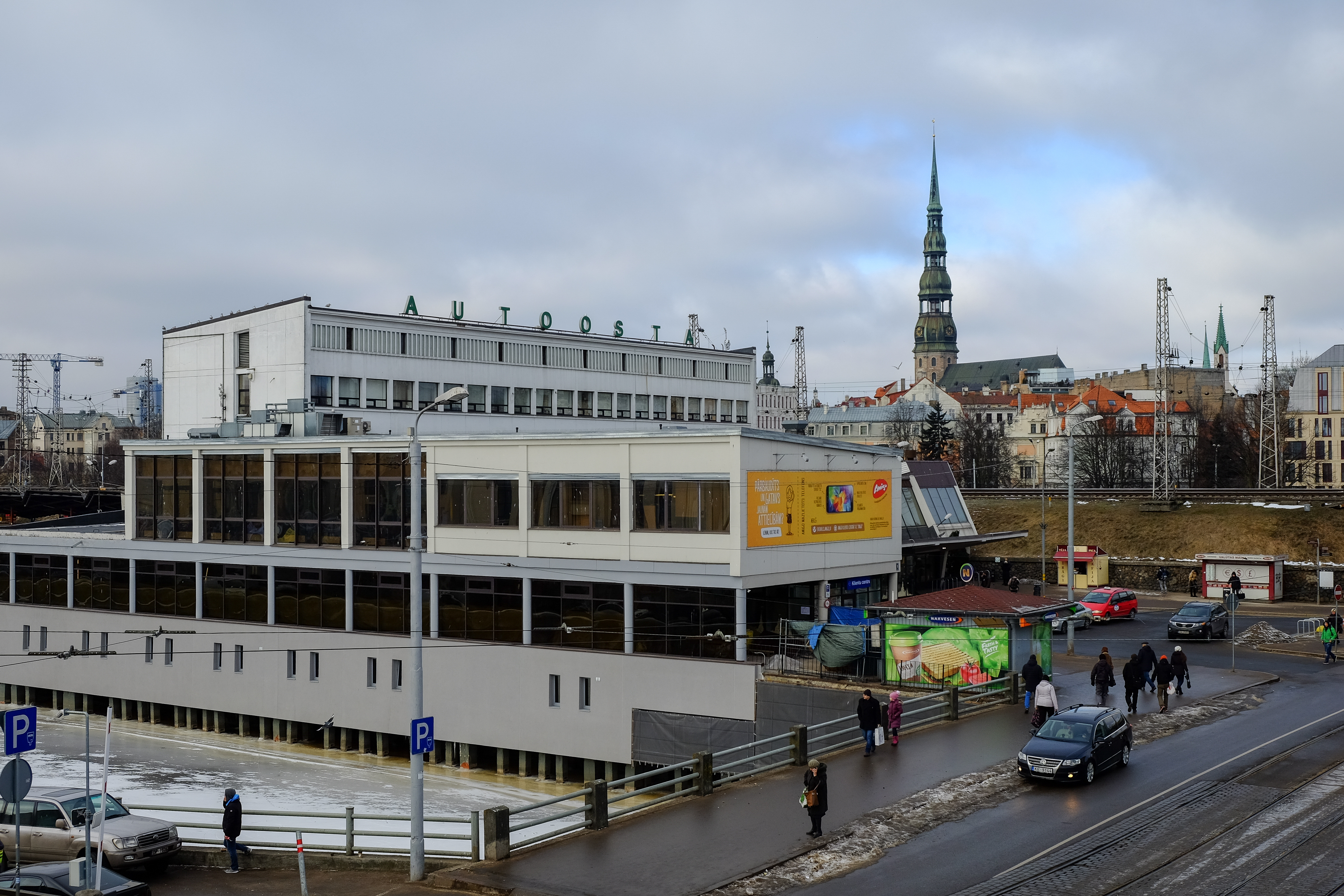 Rīgas autoosta